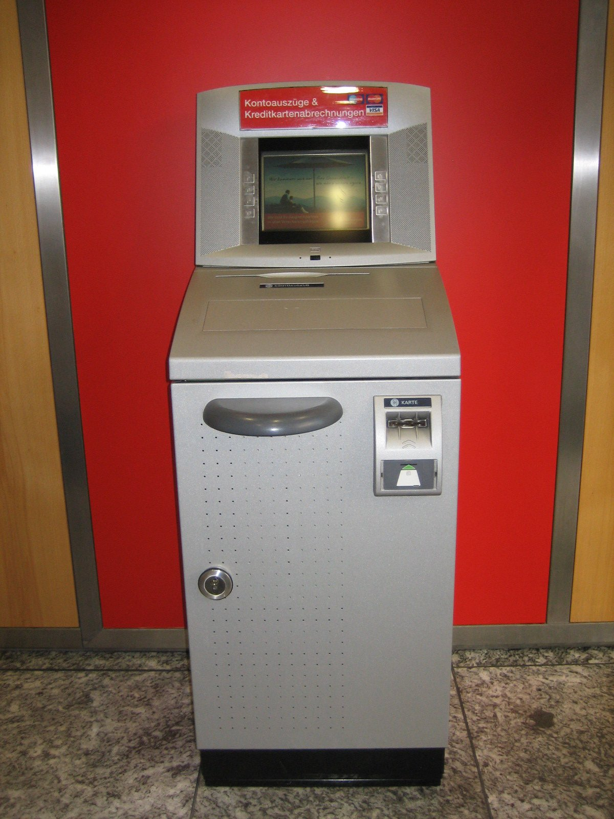 Kontoauszugsdrucker im Foyer einer Augsburger Sparkassenfiliale